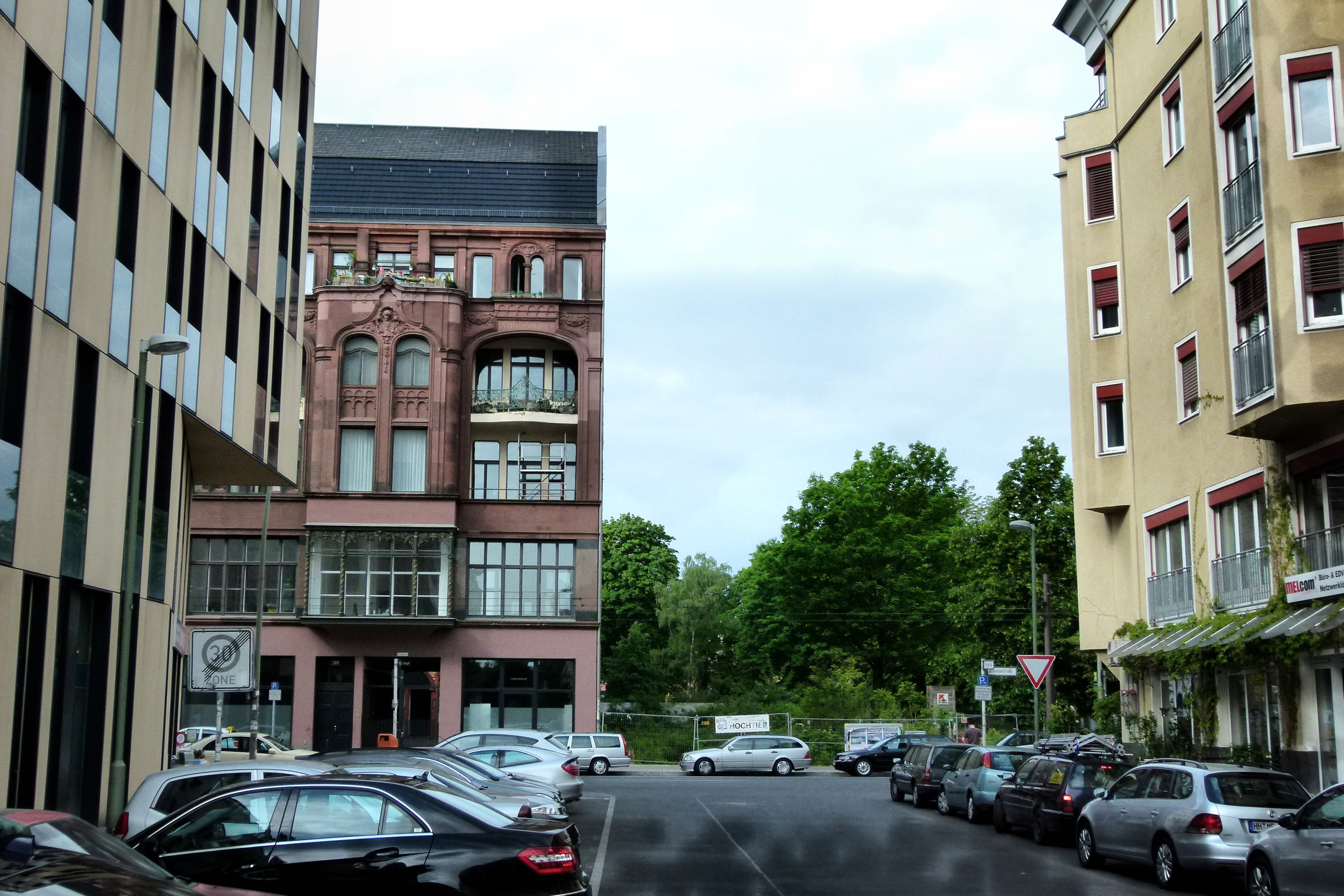 Blick aus der Schlegelstraße auf die Chausseestraße Nr. 123 und die Brache Nr. 121-122 nebenan